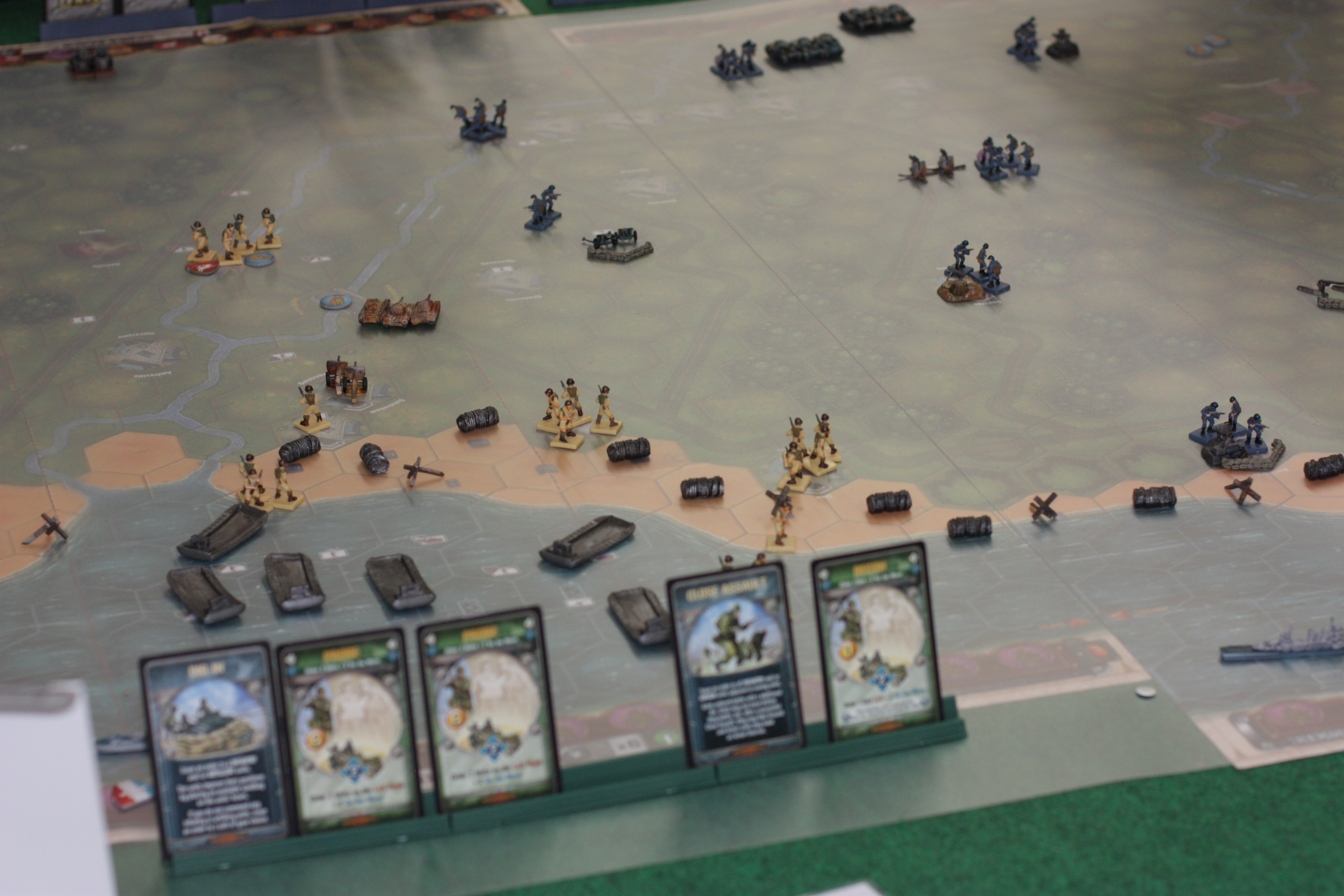 Megascenario sullo Sbarco in Normandia giocato con Memoir '44 a Play - Festival del Gioco 2015